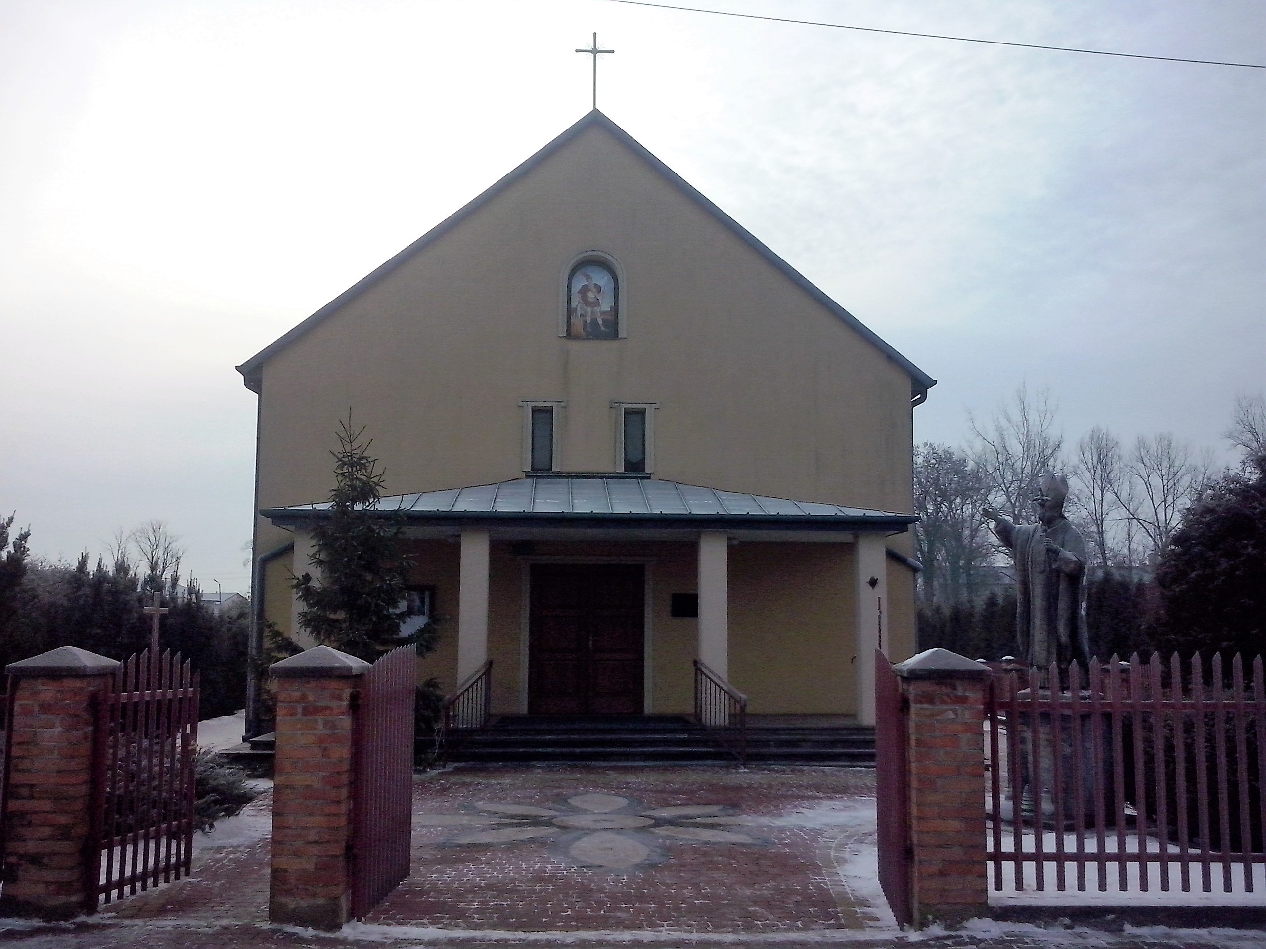 Rudzienko (gm. Kołbiel, pow. Otwock) - kościół Miłosierdzia Bożego